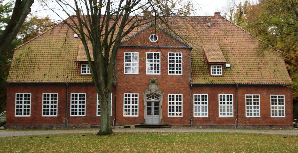 Vue du manoir de Stockelsdorf